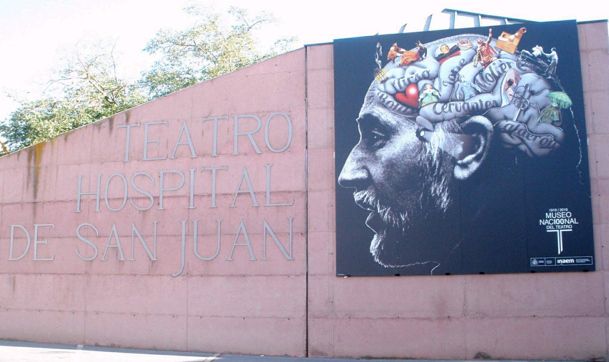 Teatro Adolfo Marsillach Hospital de San Juan (Almagro, Ciudad Real)